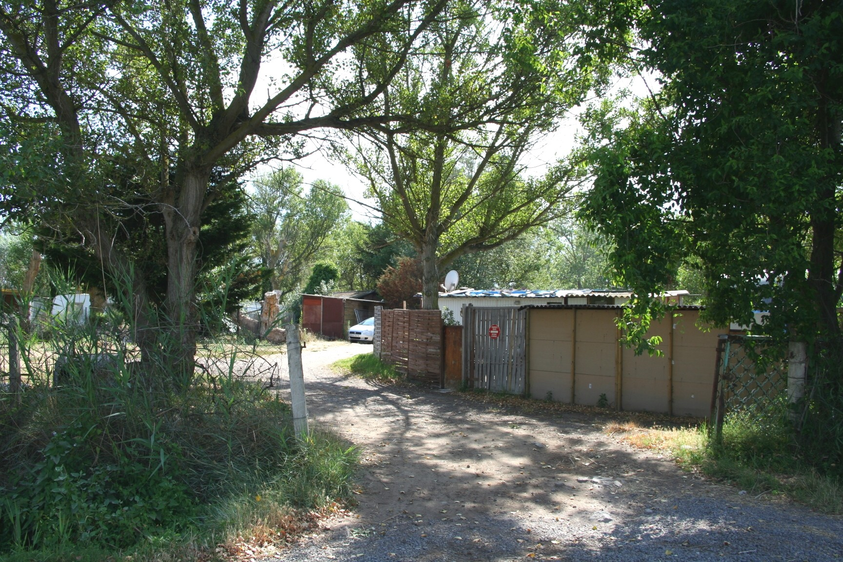 Aspect de la « cabanisation » en bord de mer, secteur du Grand Quist, près de Rochelongue, à Agde (Hérault - France)